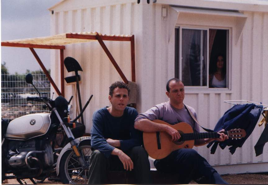 הגרעין הקשה